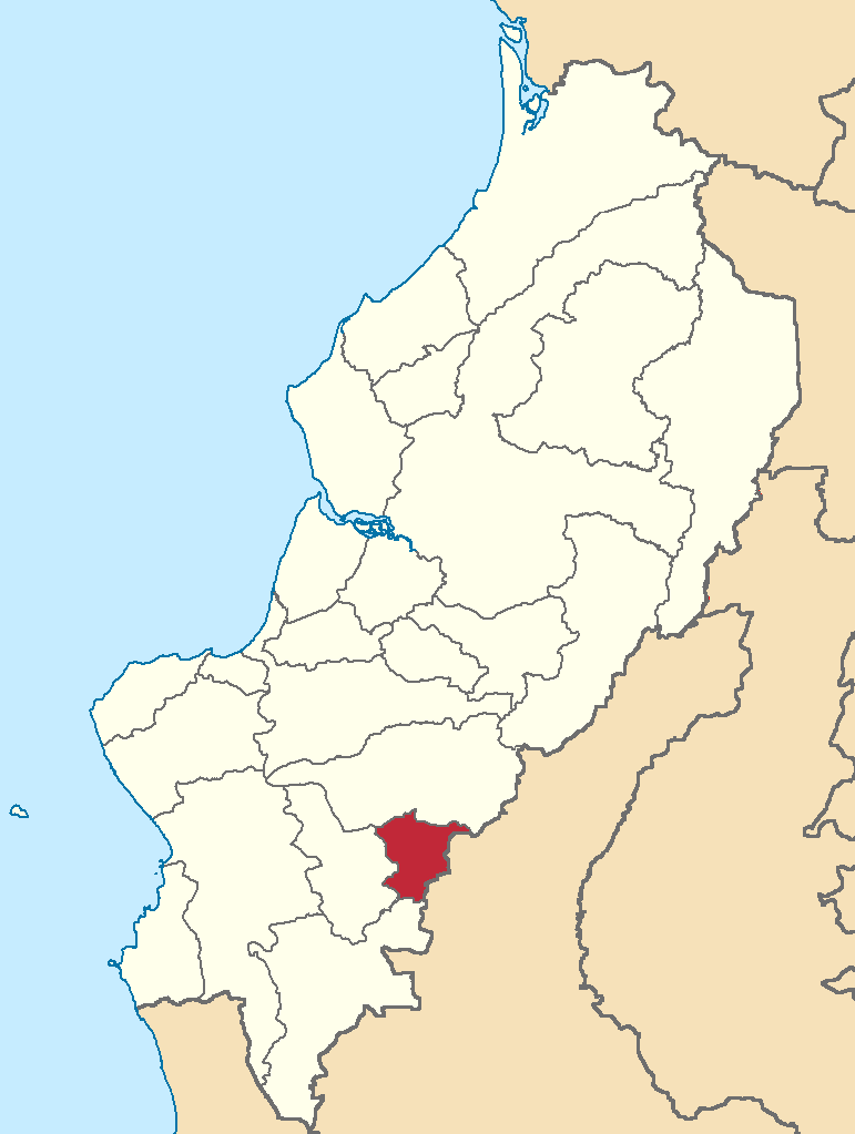 Mapa localizador del cantón en Manabí, Ecuador